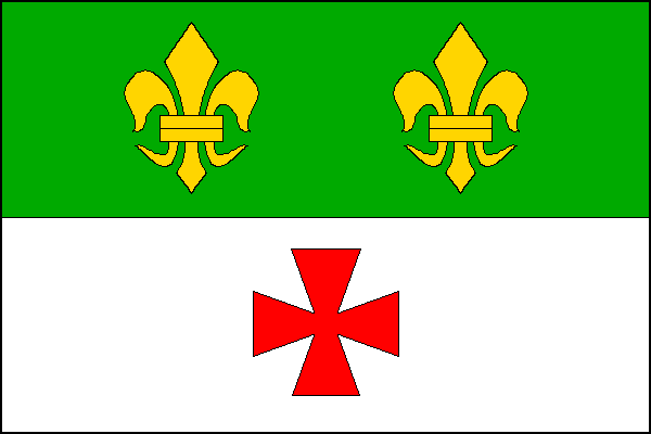 vlajka, Jamolice, okres Znojmo